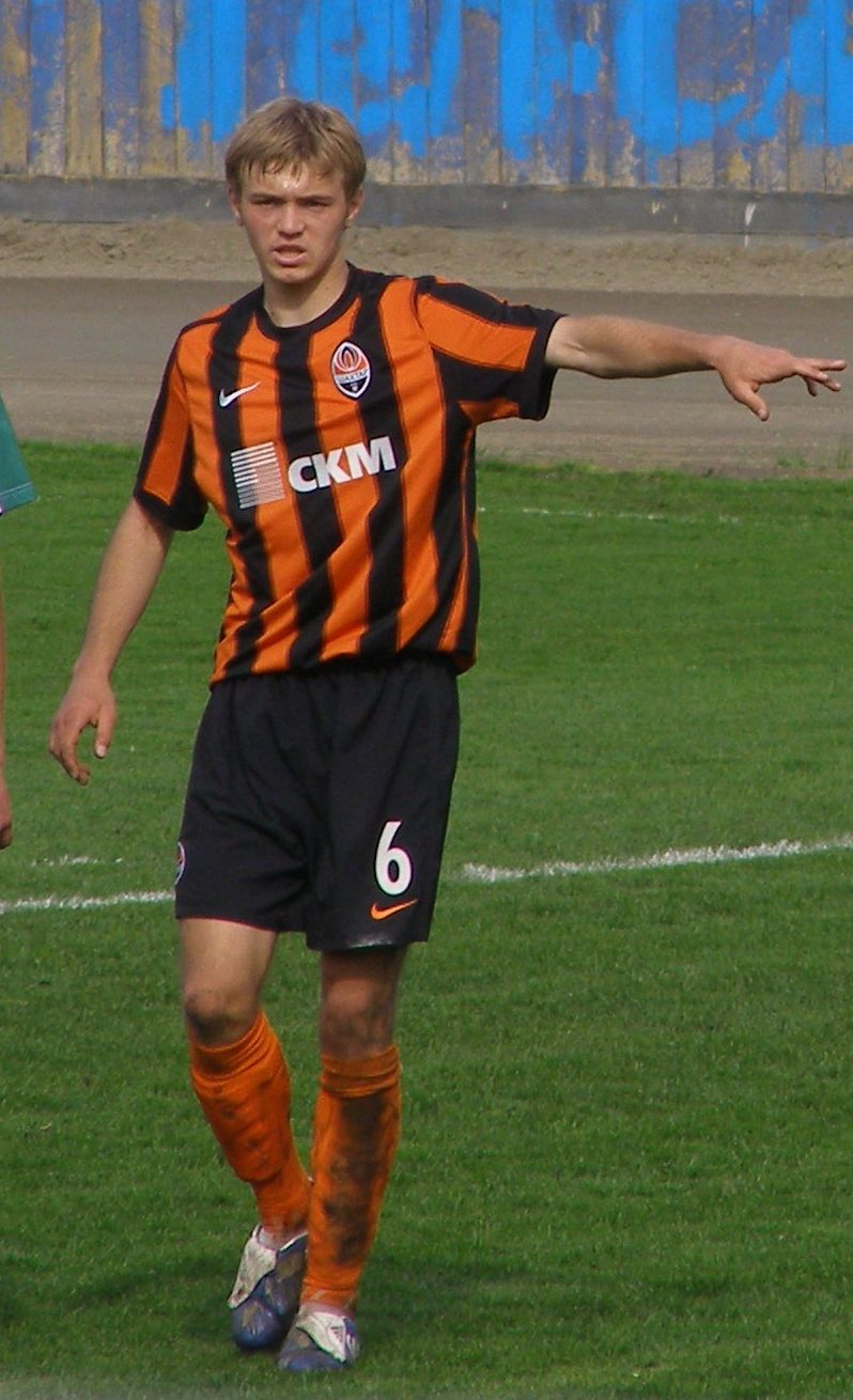 Dmytro Hretschyschkin - ukrainischer Fußballspieler